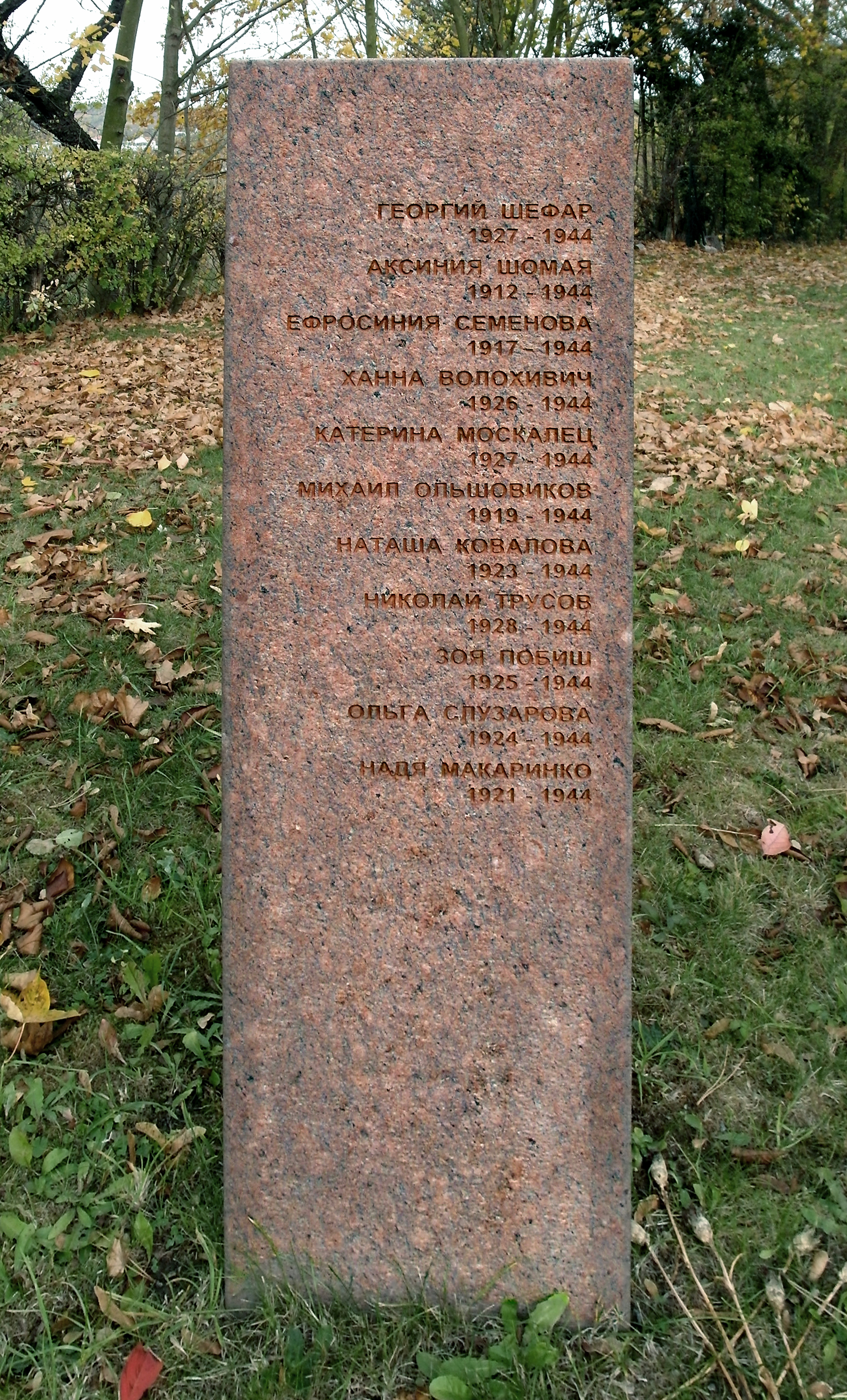 02.11.2018 01705 Freital-Schweinsdorf, Poisentalstraße 31 / Wartburgstraße: Johannisfriedhof Schweinsdorf (GMP: 50.992397,13.652650); auch: Deubener Friedhof. Ehrenhain für die Opfer der NS-Zwangsarbeit in Freital, zum Großteil Sowjetbürger. Die Einzelgrabmale wurden nach 2000 durch insgesamt neun dreieckige Stelen ersetzt. Hier eine der Gedenksäulen (GMP: 50.98987,13.64895). [SAM8532.JPG]20181101215DR.JPG(c)Blobelt